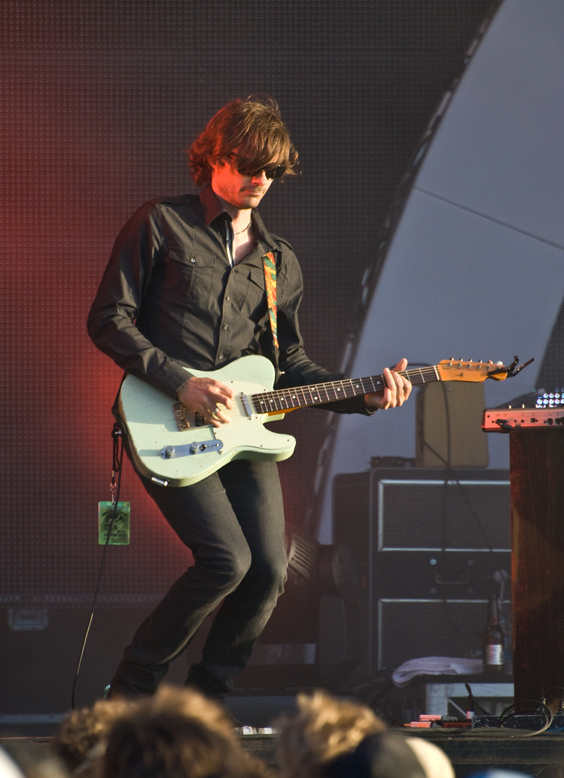 Darren Middleton of Powderfinger performing at Big Day Out 2010